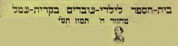 צבי לוי מתוך תמונת סיום מחזור ה בבית הספר לילדי עובדים בקרית עמל